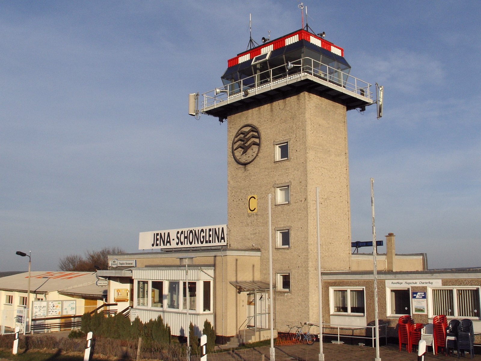 Schöngleina Tower Flugplatz Jena-Schöngleina EDBJ Verkehrslandeplatz in Ost-Thüringen Foto 2005 Wolfgang Pehlemann RIF_0357